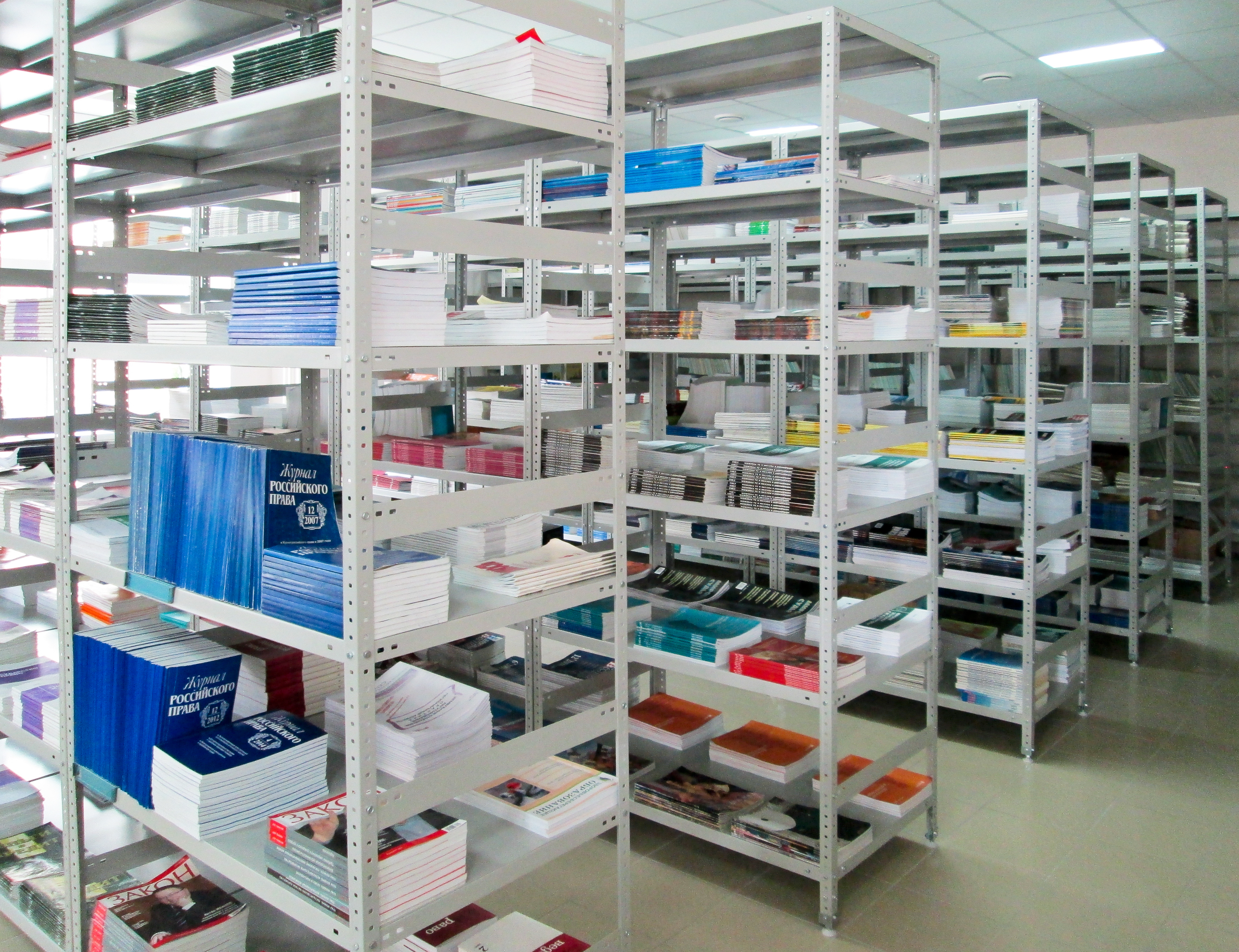 Фонд текущих периодических изданий Научной библиотеки Курского государственного университета